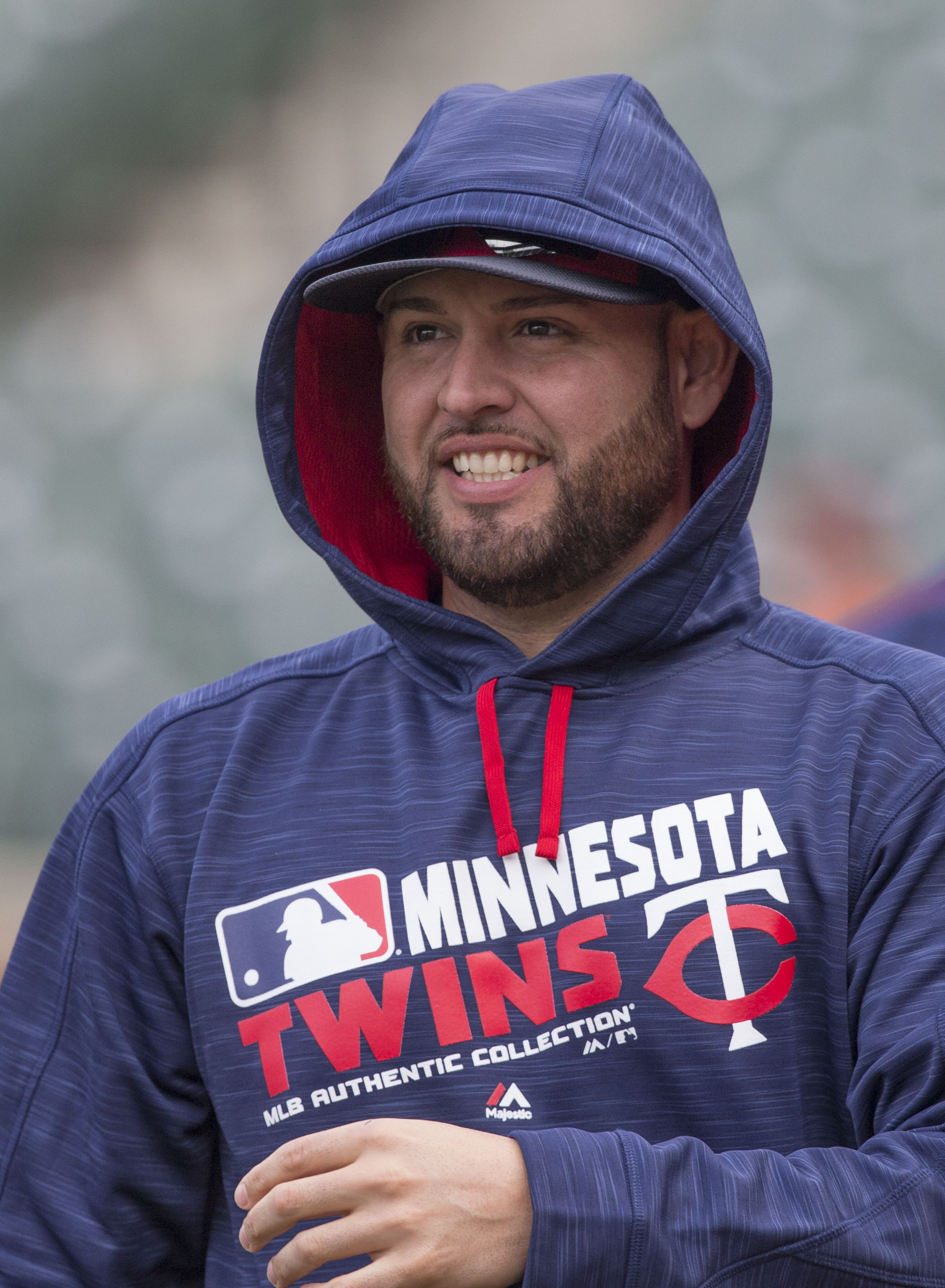 Ricky Nolasco